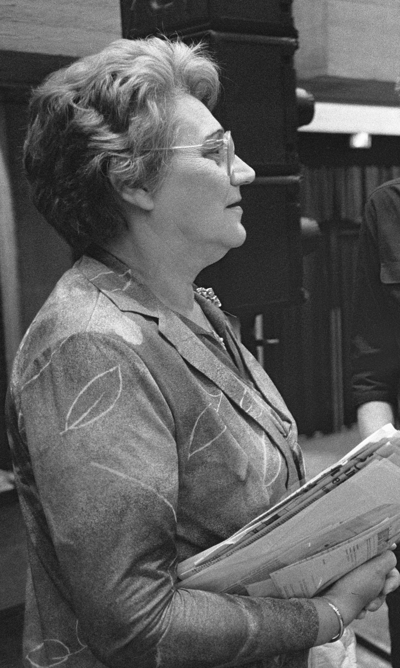 Collectie / Archief : Fotocollectie Anefo Reportage / Serie : Conferentie van burgemeesters en vredesorganisaties over kernwapens in de Flint in Amersfoort Beschrijving : IKV-secretaris Mient Jan Faber (m), burgemeester H.J.M. Defesche (Venray) (r) Datum : 9 juni 1983 Locatie : Amersfoort, Utrecht (prov) Trefwoorden : burgemeesters, conferenties, kernwapens, vredesbeweging Persoonsnaam : Defesche, H.J.M., Faber, Mient Jan Fotograaf : Croes, Rob C. / Anefo Auteursrechthebbende : Nationaal Archief Materiaalsoort : Negatief (zwart/wit) Nummer archiefinventaris : bekijk toegang 2.24.01.05 Bestanddeelnummer : 932-6168